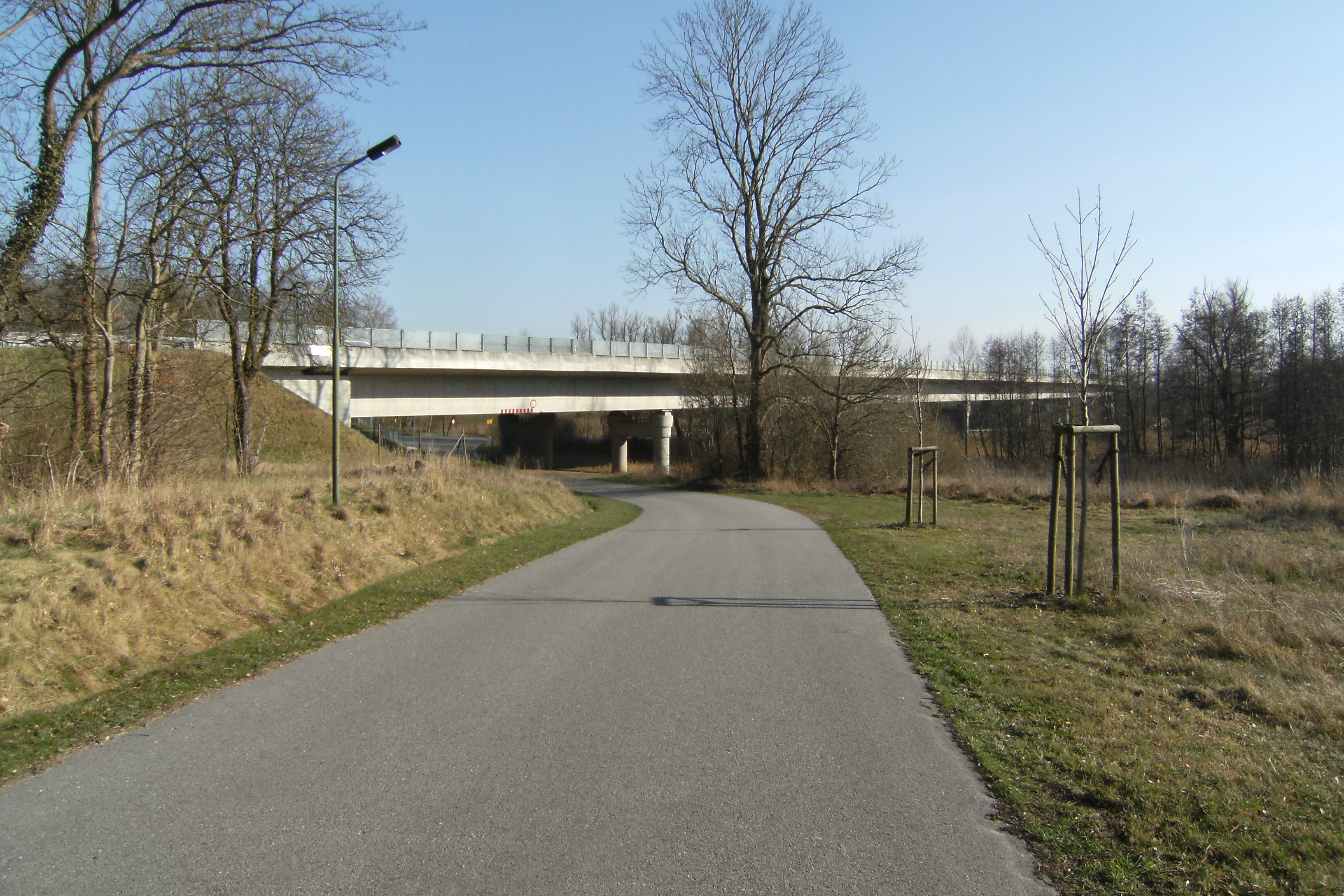 Die nördliche Landanbindung der Peenetalbrücke A 20 bei Breechen